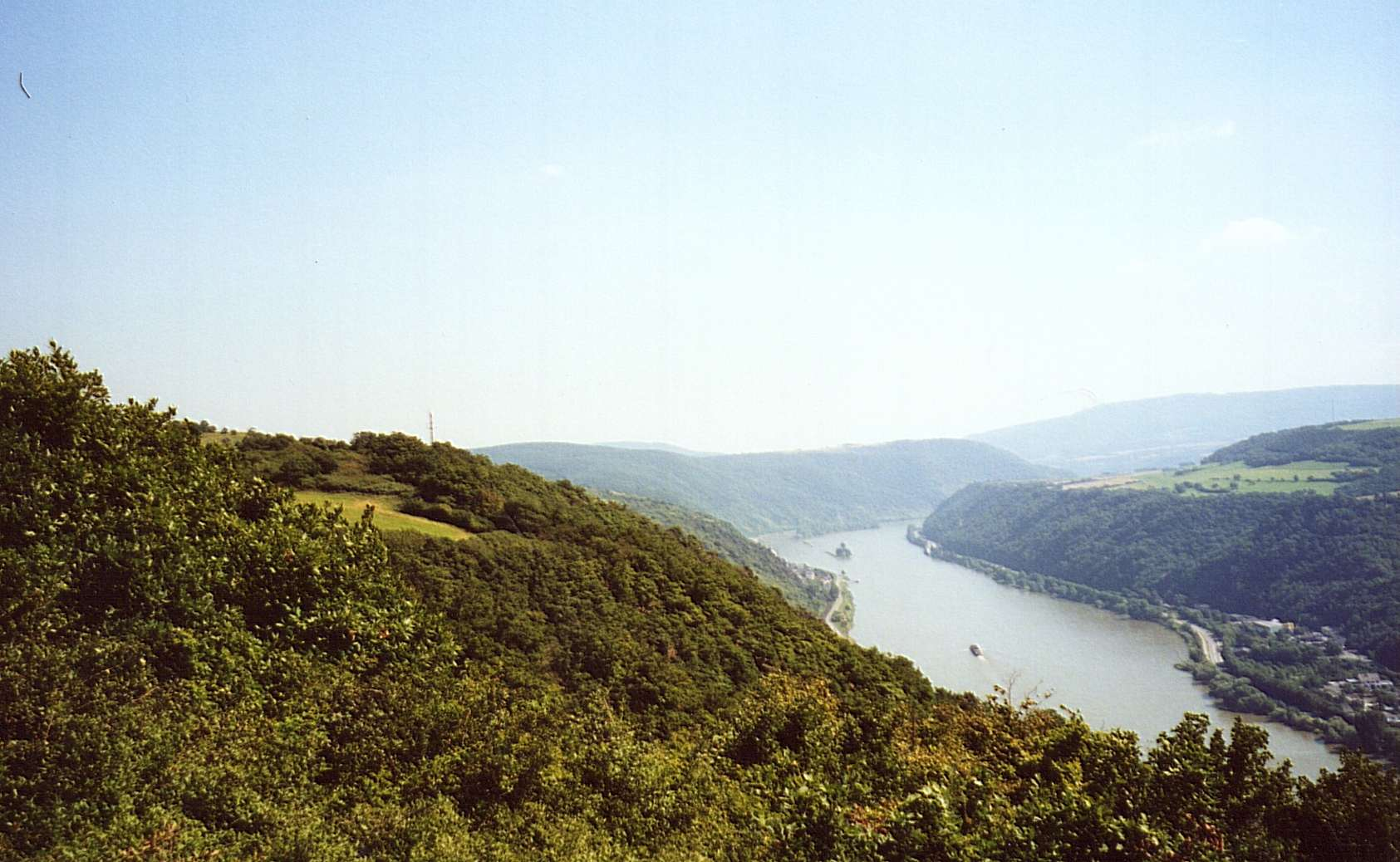 Der Rhein von der Schwedenschanze aus gesehen. Im Hintergrund erkennt man mitten im Rhein die Zollburg Pfalzgrafenstein bei Kaub.